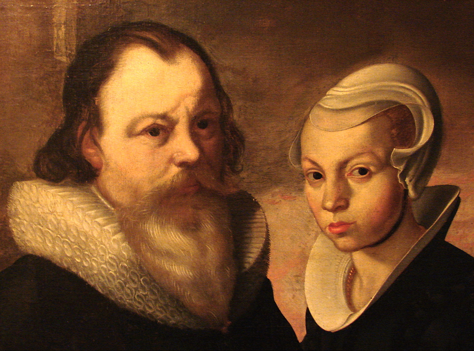 Ole Worm og hans første kone Dorothea Fincke, udsnit fra maleri af Worm med familie, Nationalmuséet i København